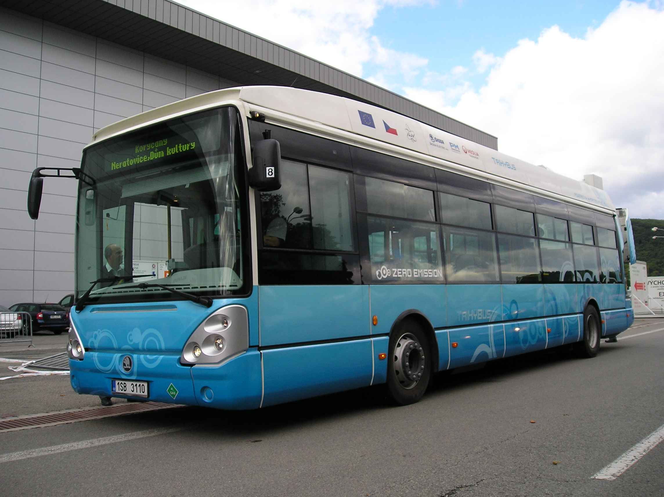 TriHyBus, hybridní autobus s pohonem na vodík